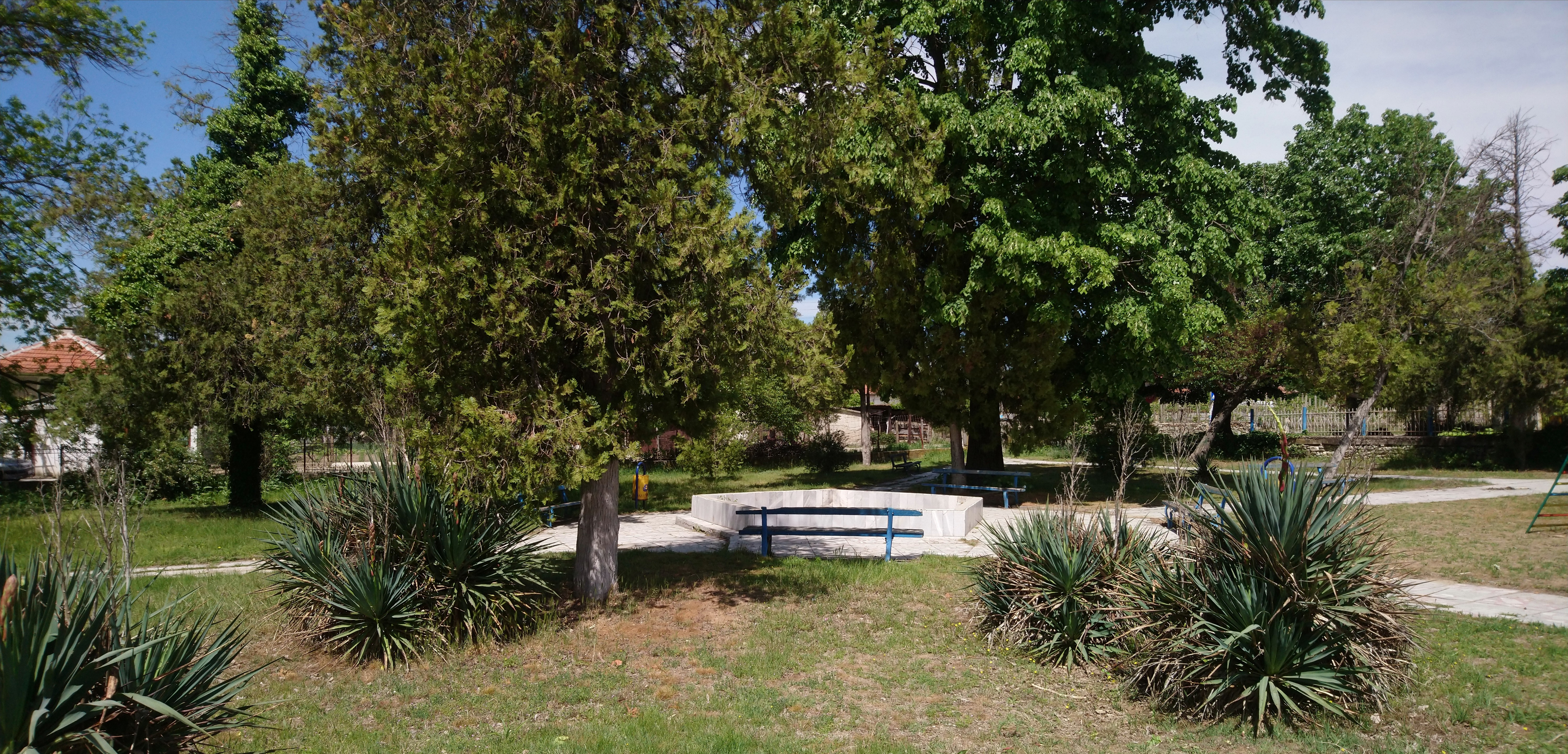 Градината в центъра на село Марино поле